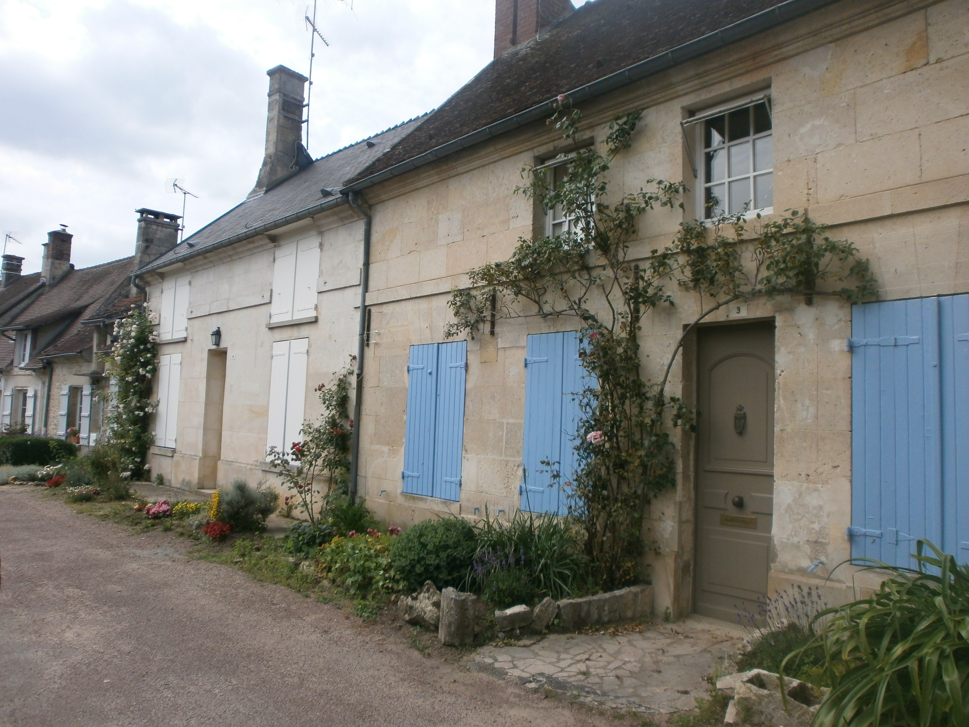 La rue des Abbessesà Saint-Jean-aux-Bois